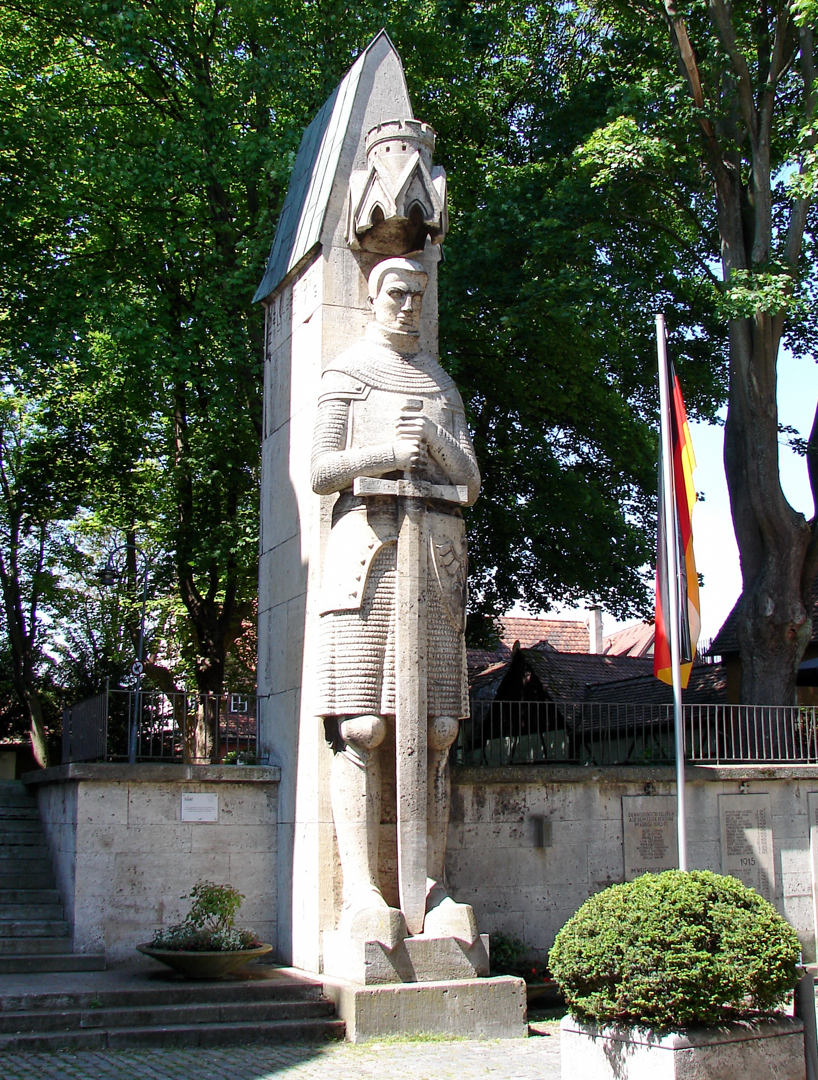 Der Bad Windsheimer „Roland“ ist das 1928 auf dem Marktplatz bei der Kilianskirche errichtete Kriegerdenkmal für die 1914–1918 Gefallenen.